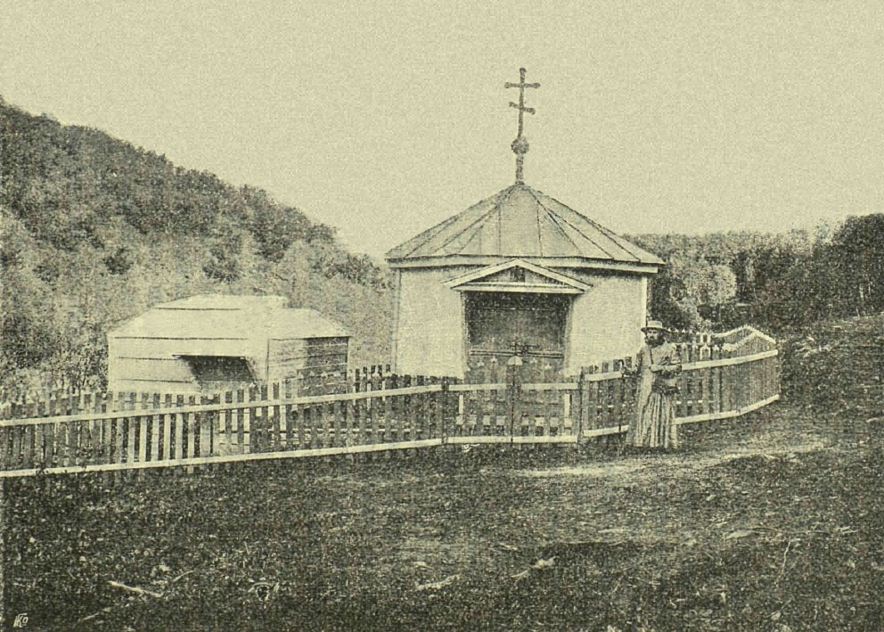 часовня над источником, вырытом преп. Евфросинией